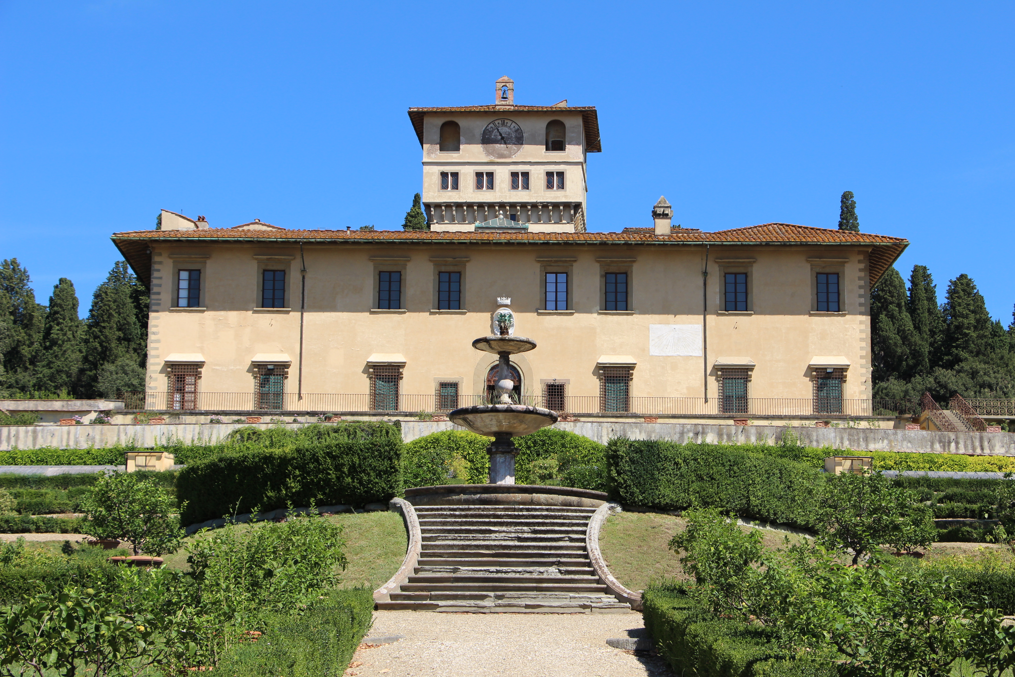 Villa medicea della Petraia - MIBAC The making of this document was supported by Wikimedia CH. (Submit your project!) For all the files concerned, please see the category Supported by Wikimedia CH. This is a photo of a monument which is part of cultural heritage of Italy.